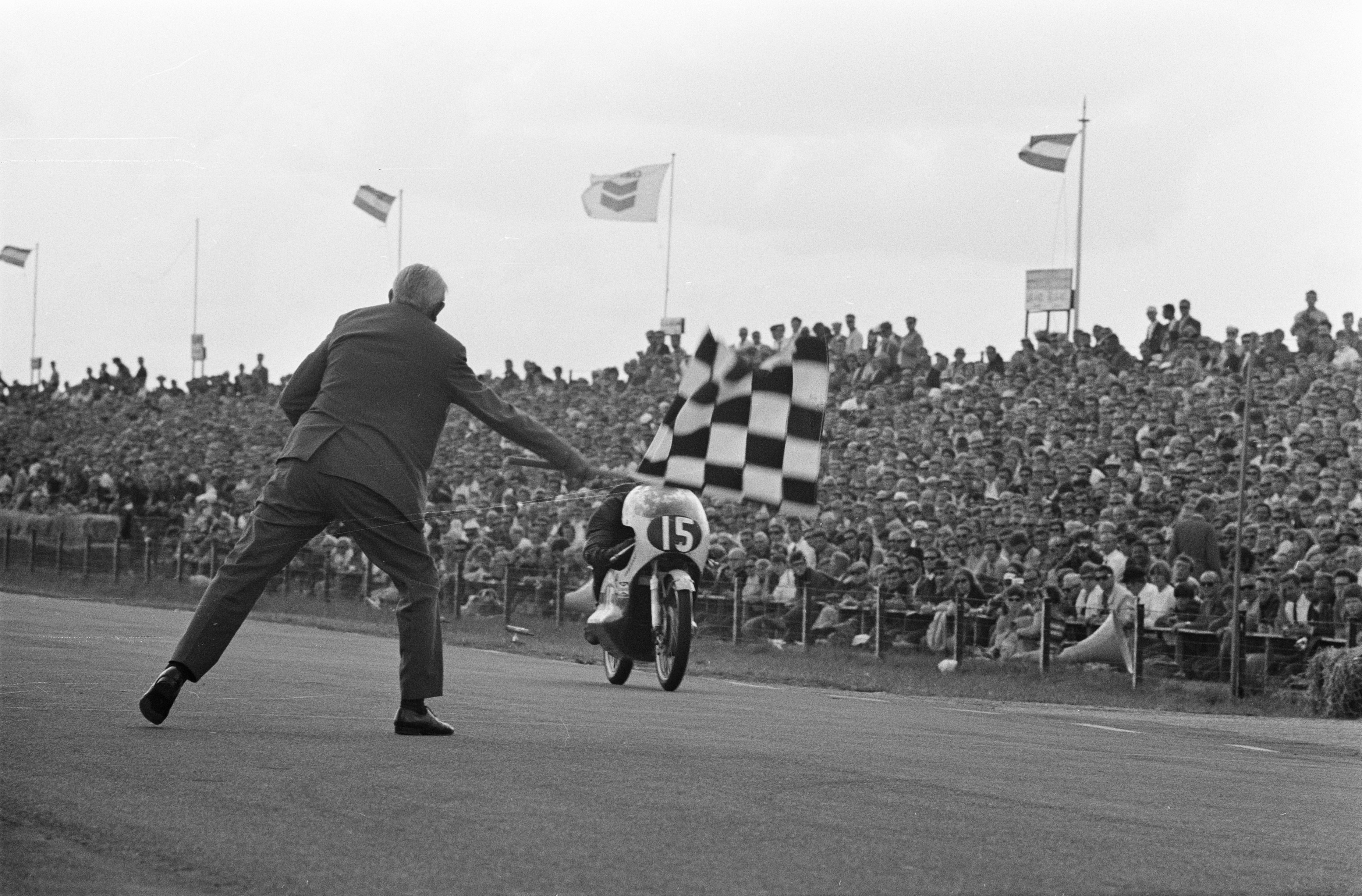 Collectie / Archief : Fotocollectie Anefo Reportage / Serie : TT Assen 1969 Beschrijving : Het afvlaggen van Dave Simmonds, de winnaar van de 125cc Annotatie : randnummers negatiefstrook: 24 en 25: Dave Simmonds randnummers negatiefstrook: 26: Agostini V 27: P. Williams Datum : 28 juni 1969 Locatie : Assen, Drenthe Trefwoorden : motorcoureurs, motorraces, motorsport, racecircuits, winnaars Persoonsnaam : Simmonds, Davev Instellingsnaam : TT Fotograaf : Fotograaf Onbekend / Anefo Auteursrechthebbende : Nationaal Archief Materiaalsoort : Negatief (zwart/wit) Nummer archiefinventaris : bekijk toegang 2.24.01.05 Bestanddeelnummer : 922-5835